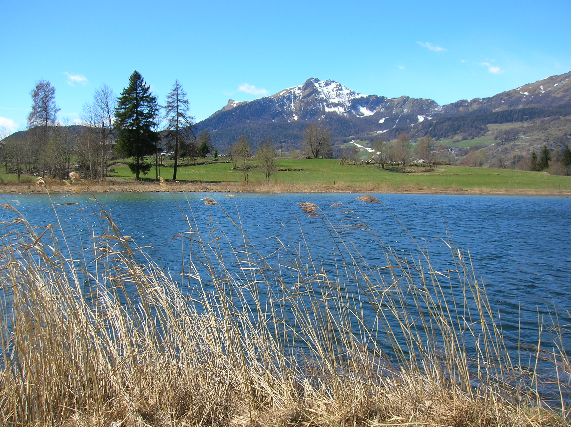 Lago di Lod in loc. Lod, Antey-Saint-André, Valle d'Aosta, Italia.